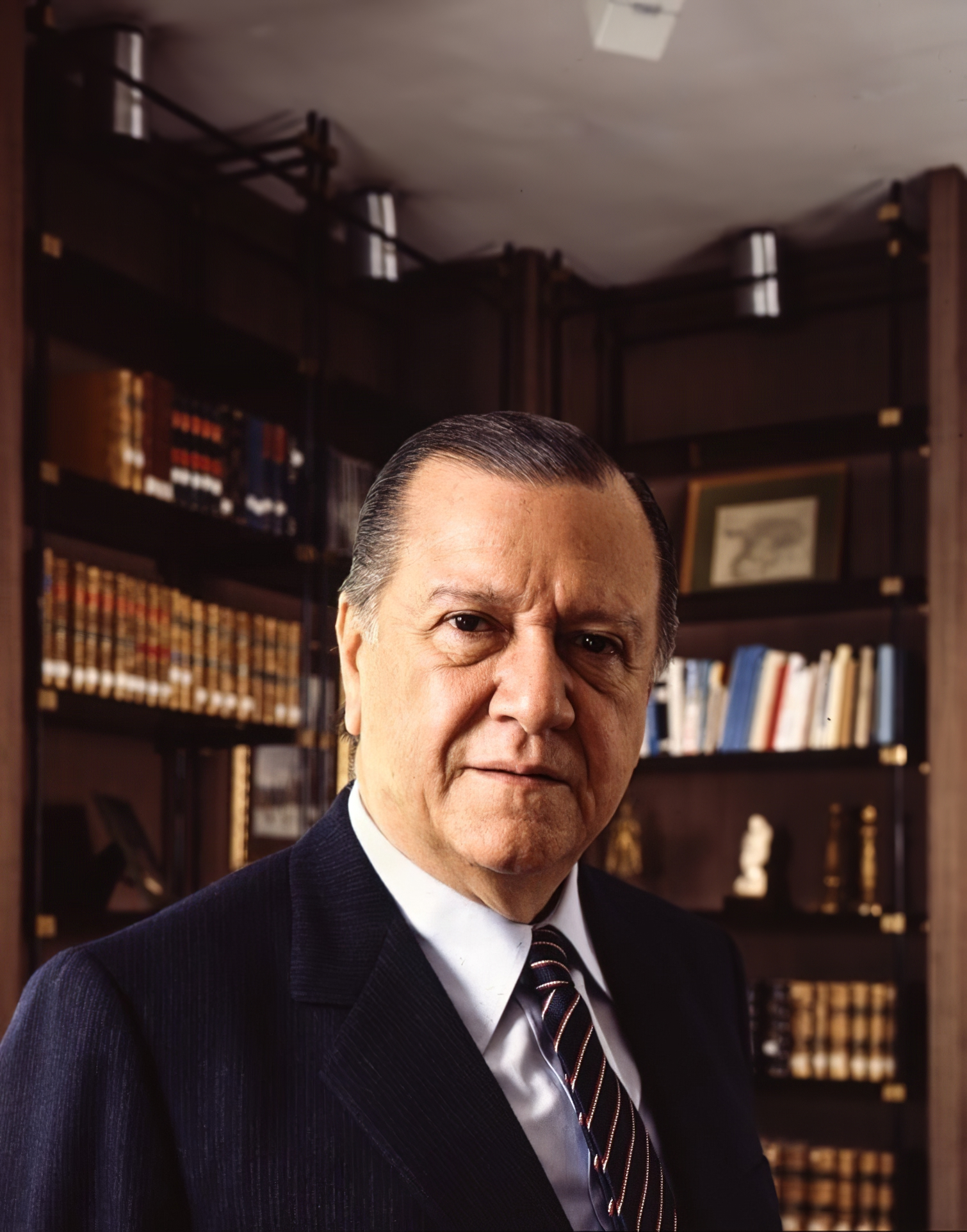 Retrato de Rafael Caldera en la biblioteca de su residencia, Tinajero.